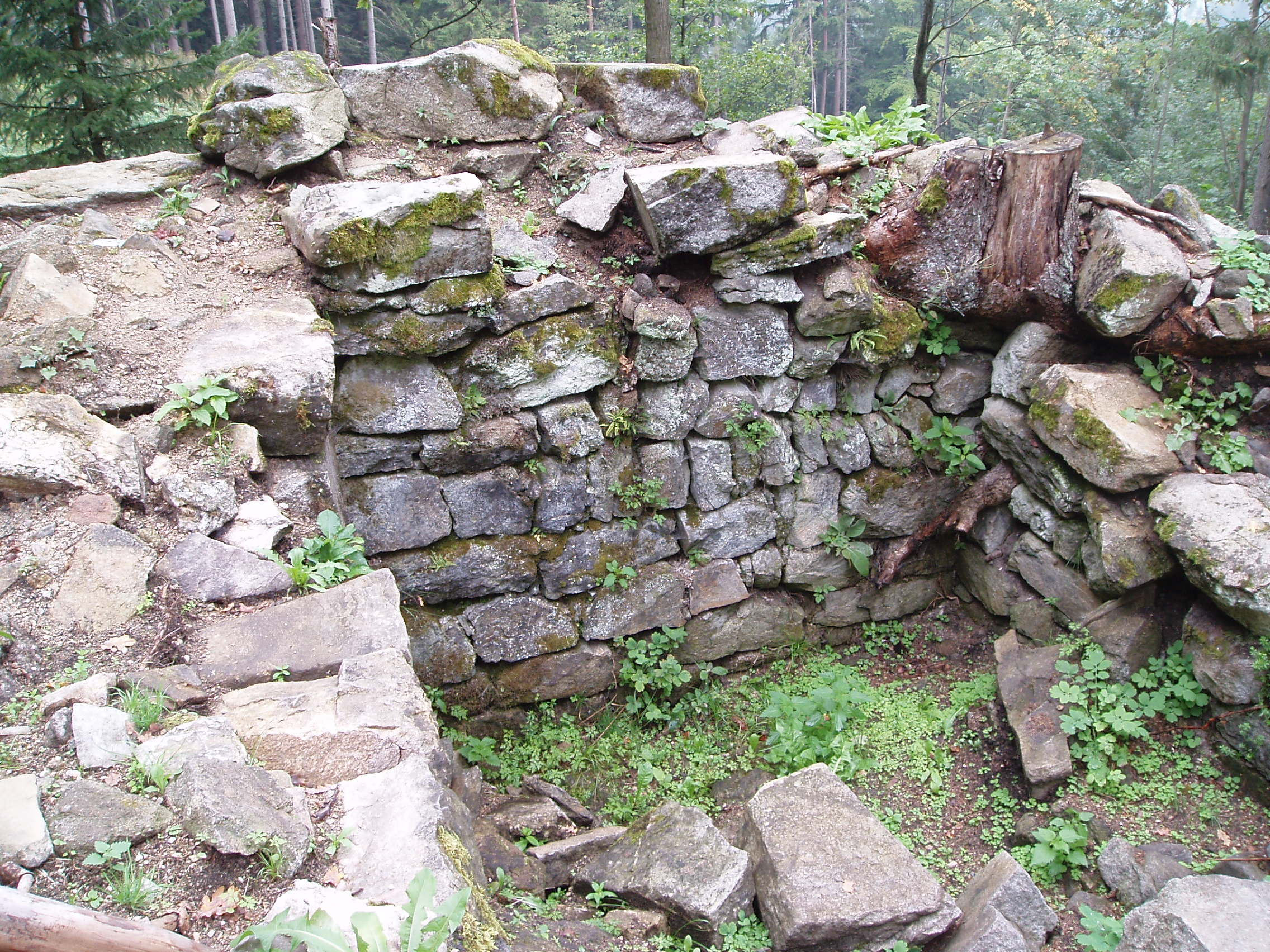 Turndobl Ruinenreste